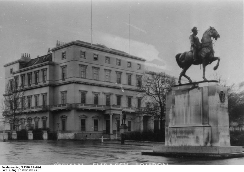 London, Deutsche Botschaft Deutsche Botschaft London 1930-32 [?]ansicht mit Eingang Im Weltkrieg von deutschen Fliegern zerstört [Großbritannien, London.- Deutsche Botschaft (Postkarte)]